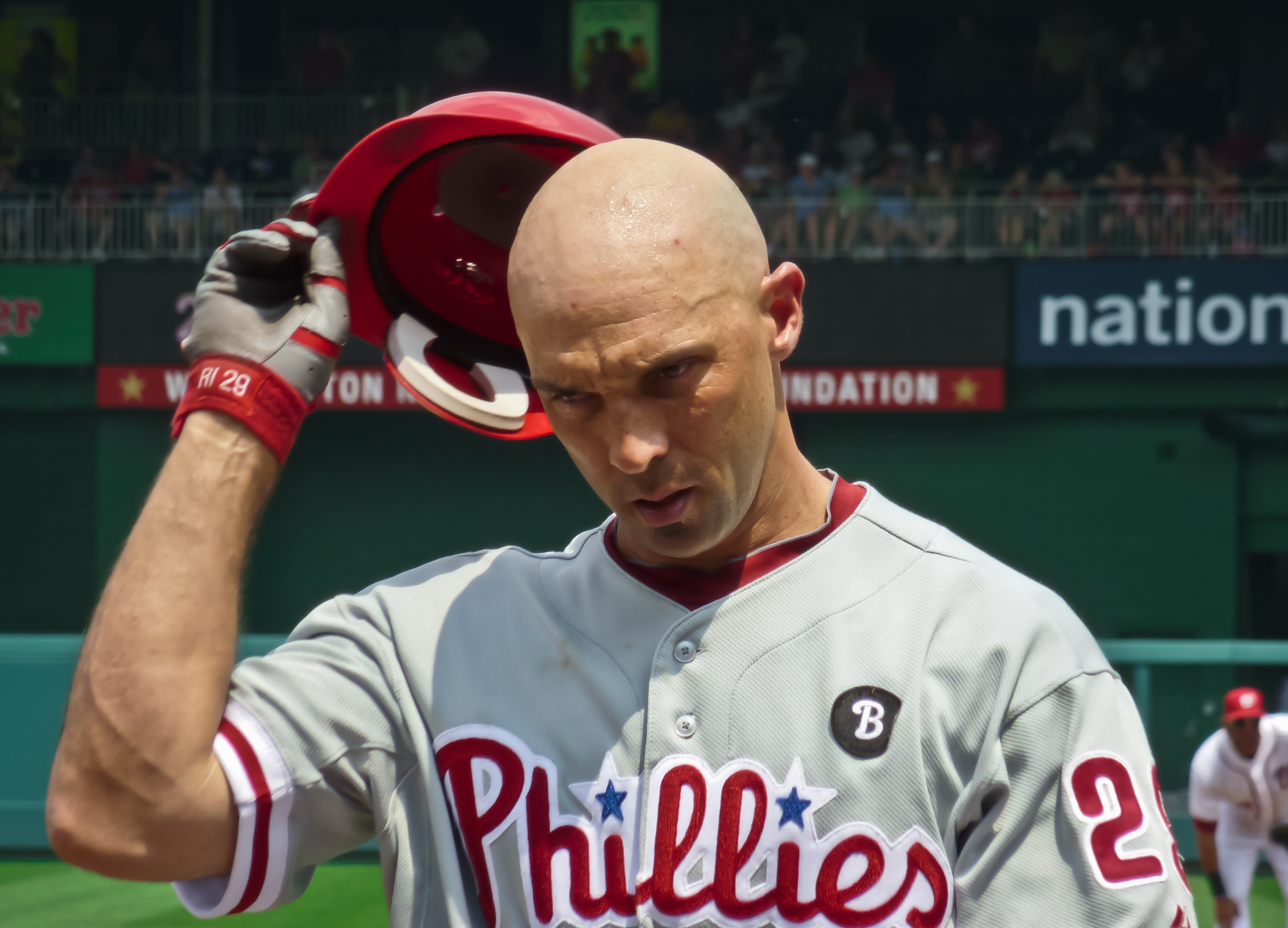 Raúl Ibañez